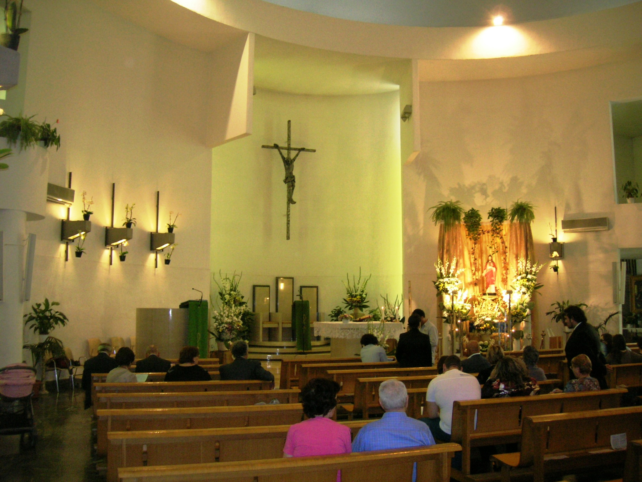 L'altare maggiore della chiesa di Sant'Antonio da Padova di Castellammare di Stabia